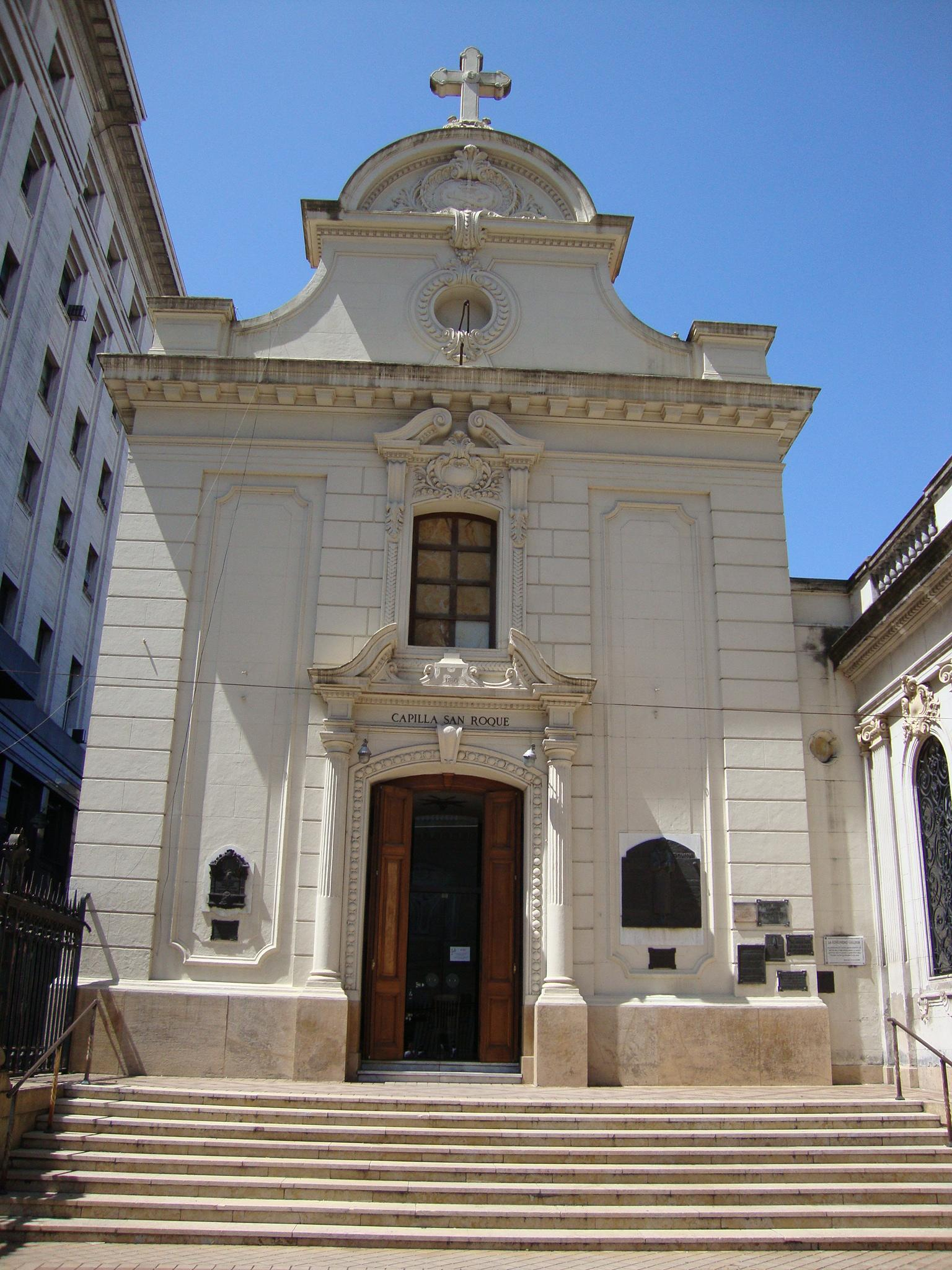 Fachada de la Capilla en la ciudad de Buenos Aires, Argentina. Está en la esquina de las calles Adolfo Alsina y Defensa, barrio de Monserrat. Comparte el atrio con la Basílica de San Francisco de Asís.